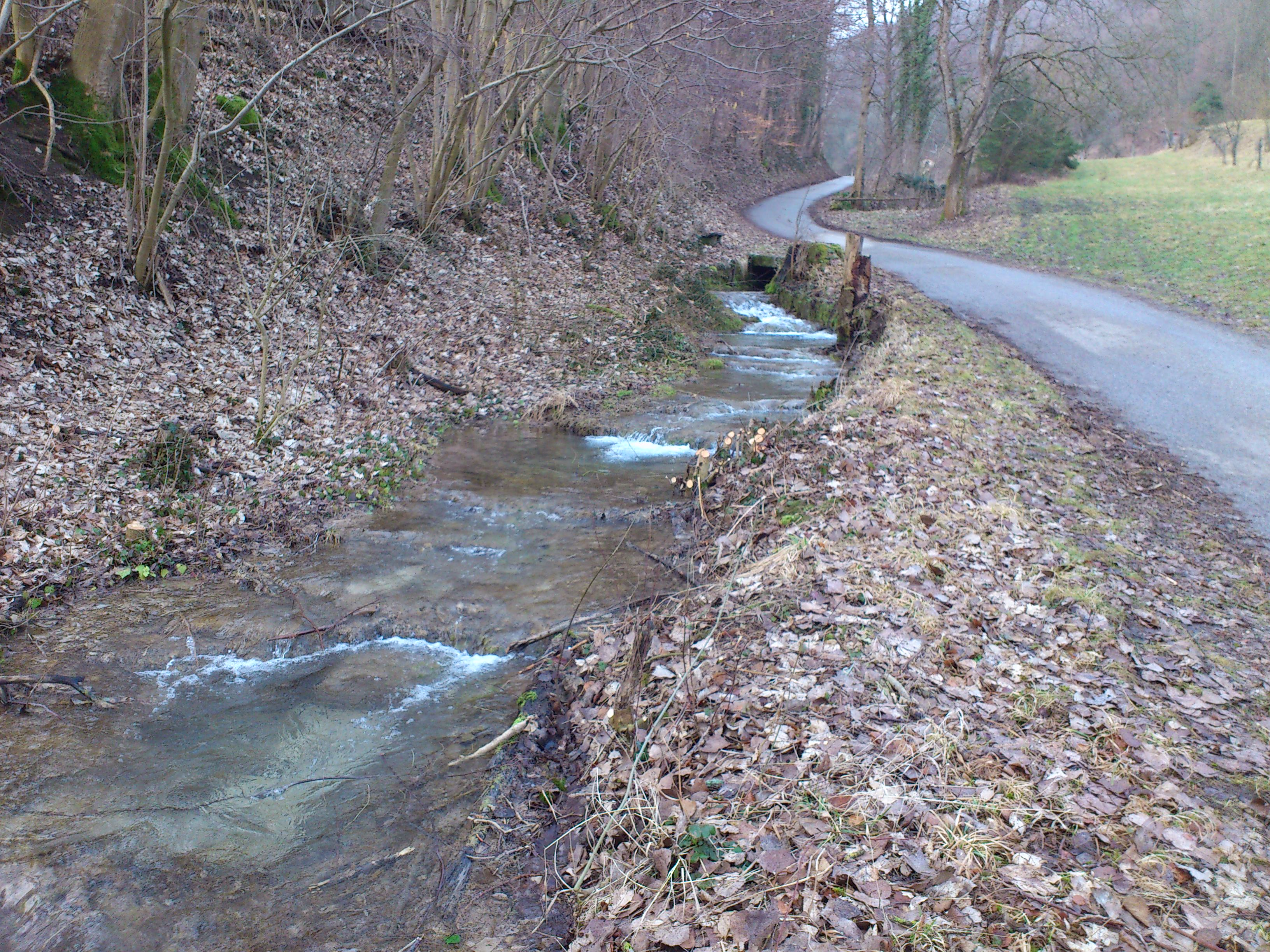 Die Lauter im Lappertal